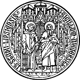 Siegel der Universität Leipzig / seal of the University of Leipzig